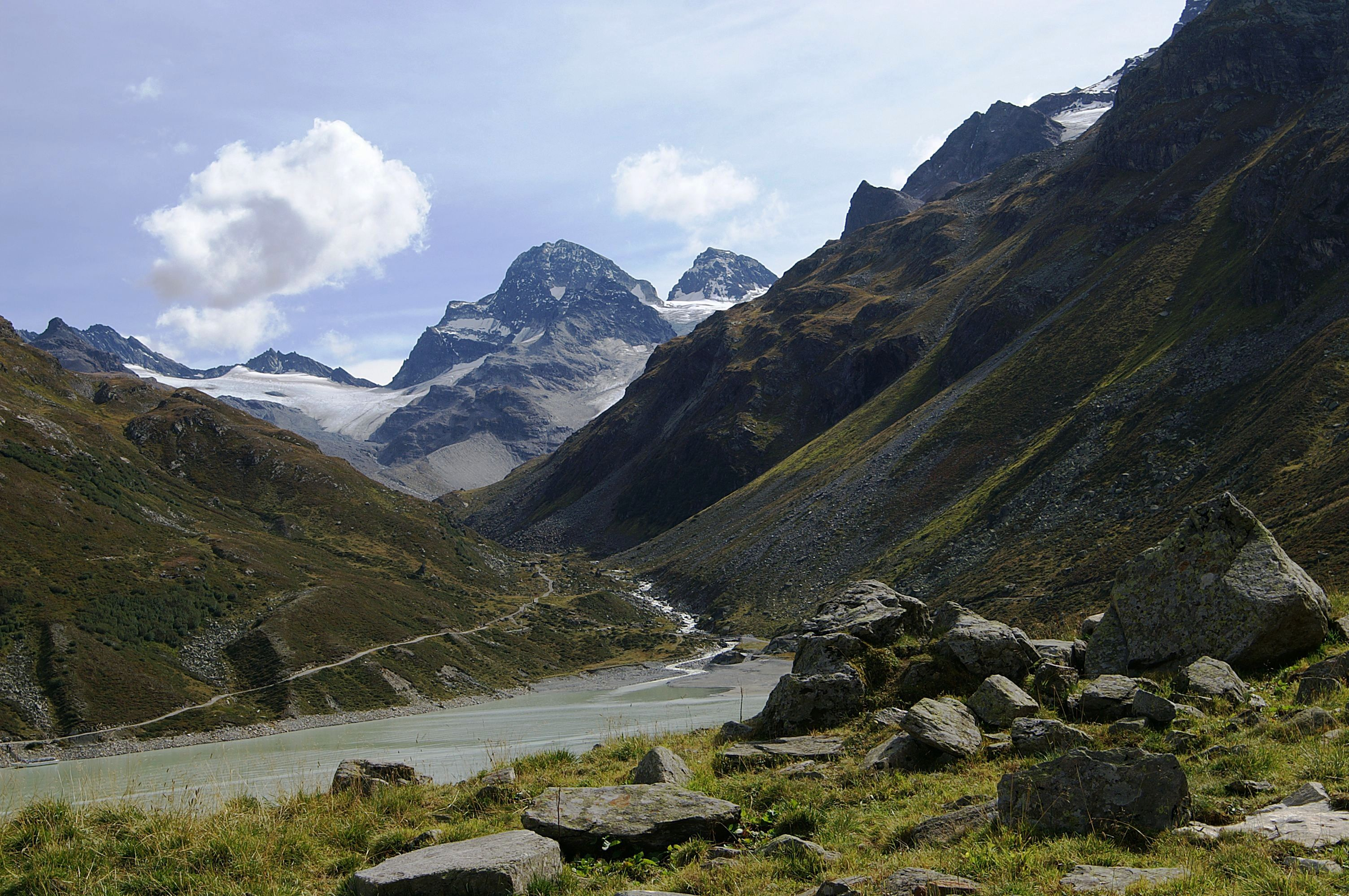 Silvretta, mit dem höchsten Berg Vorarlbergs der grosse Piz Buin 3312m und der kleine Piz Buin 3255m. Dazwischen die Buinlücke. Blick vom Silvretta-Stausee.